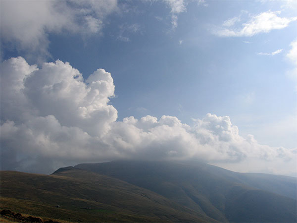 Stara planina - Midzor